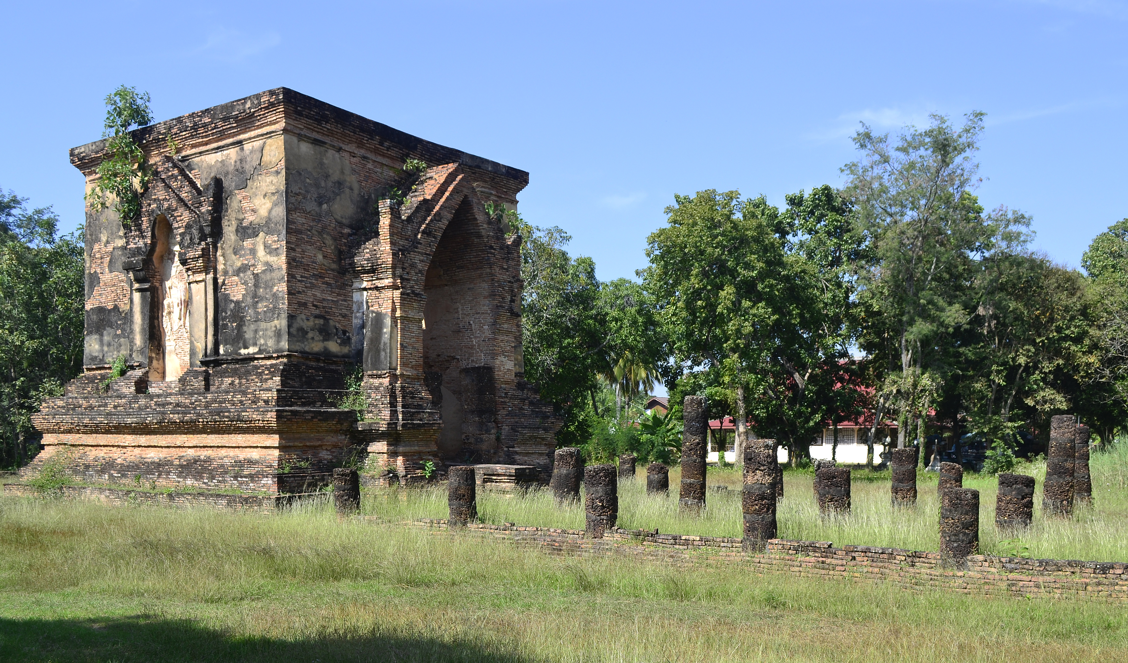 Mondop und Wihan des Wat Traphang Tong Lang im Geschichtspark Sukhothai